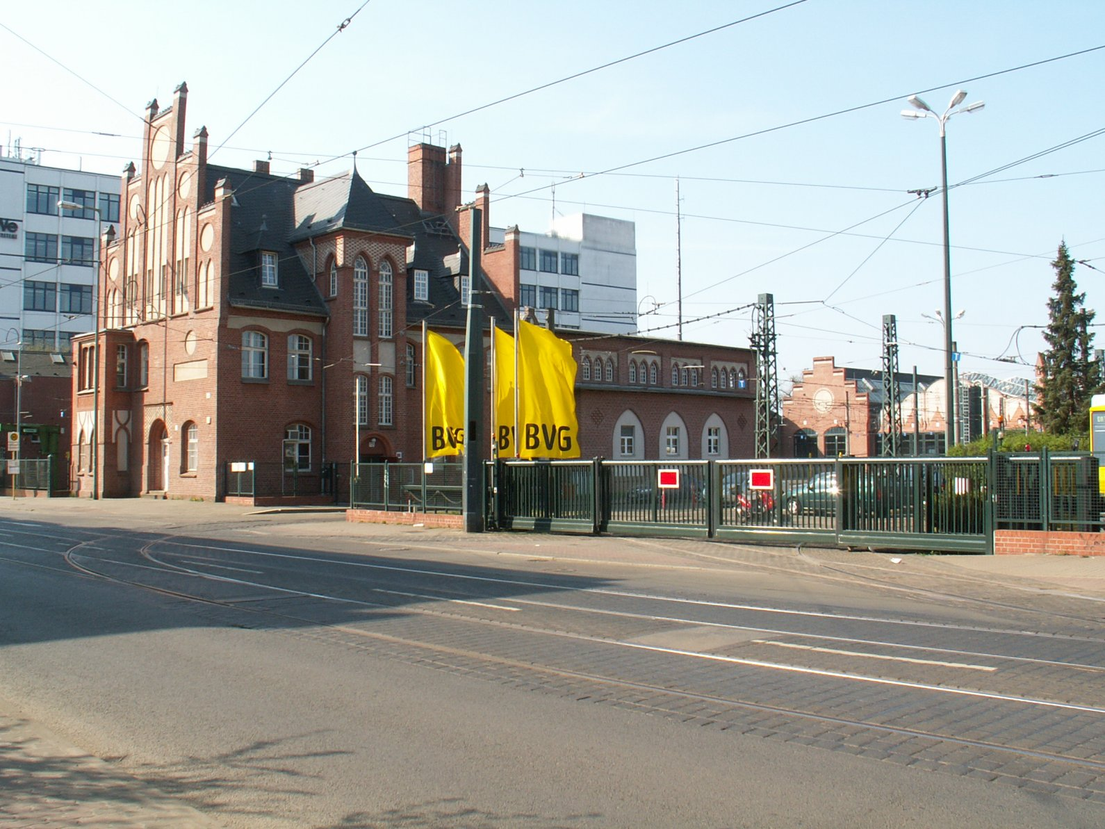 Betriebshof Köpenick der Berliner Straßenbahn